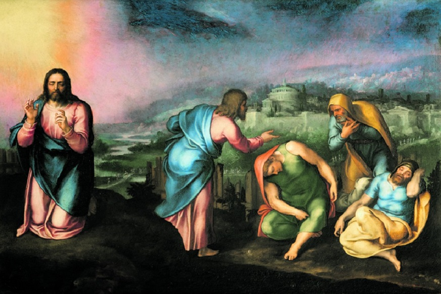 L'orazione nell'orto, olio su tavola, Roma, Gallerie Nazionali d'Arte Antica, Palazzo Barberini